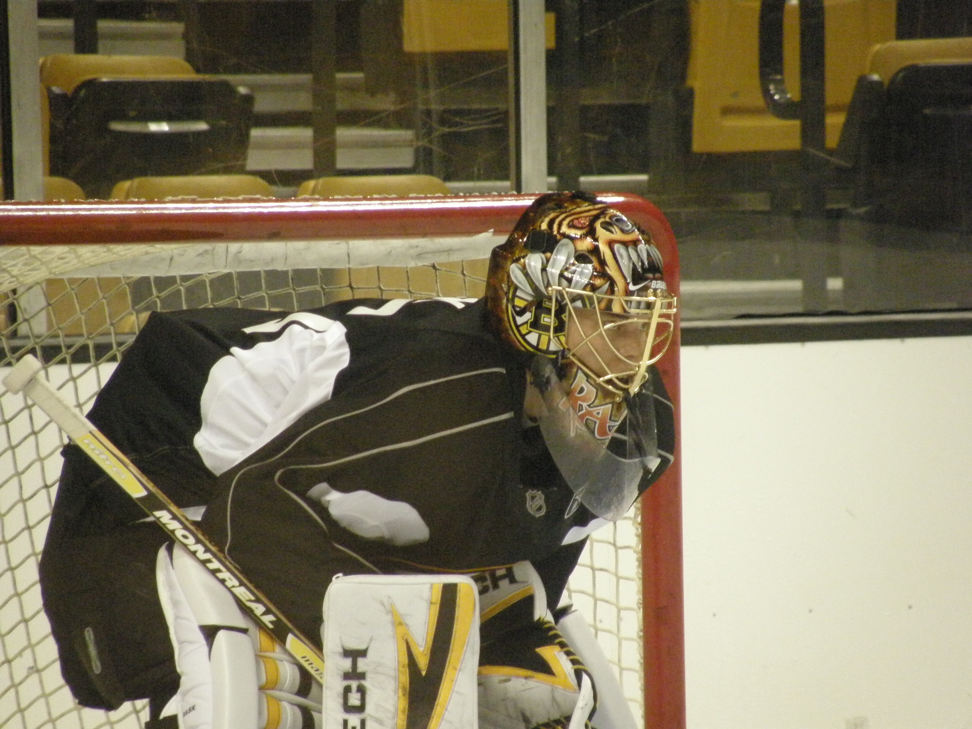 Boston Bruins #40 Tuukka Rask (G)